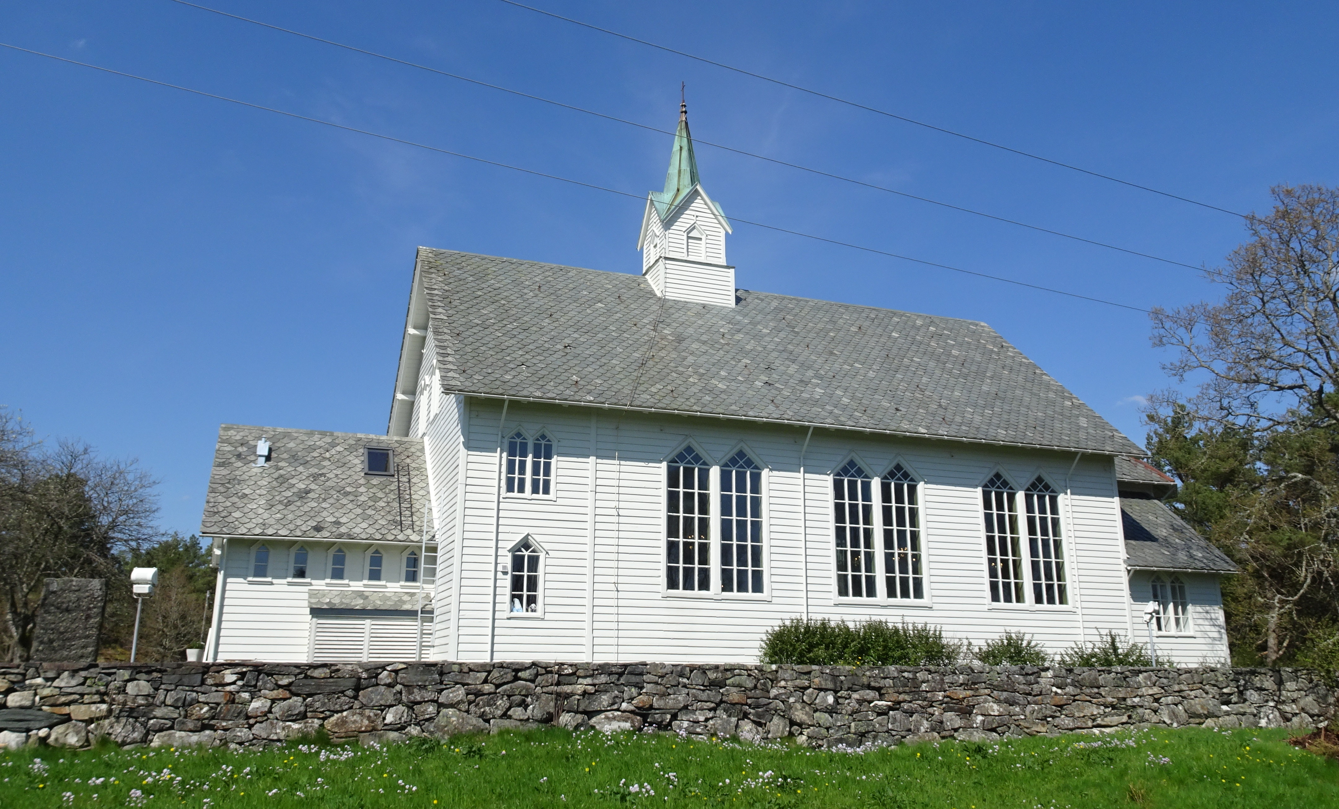 Moster (nye) kirke, Bømlo kommune, Hordaland